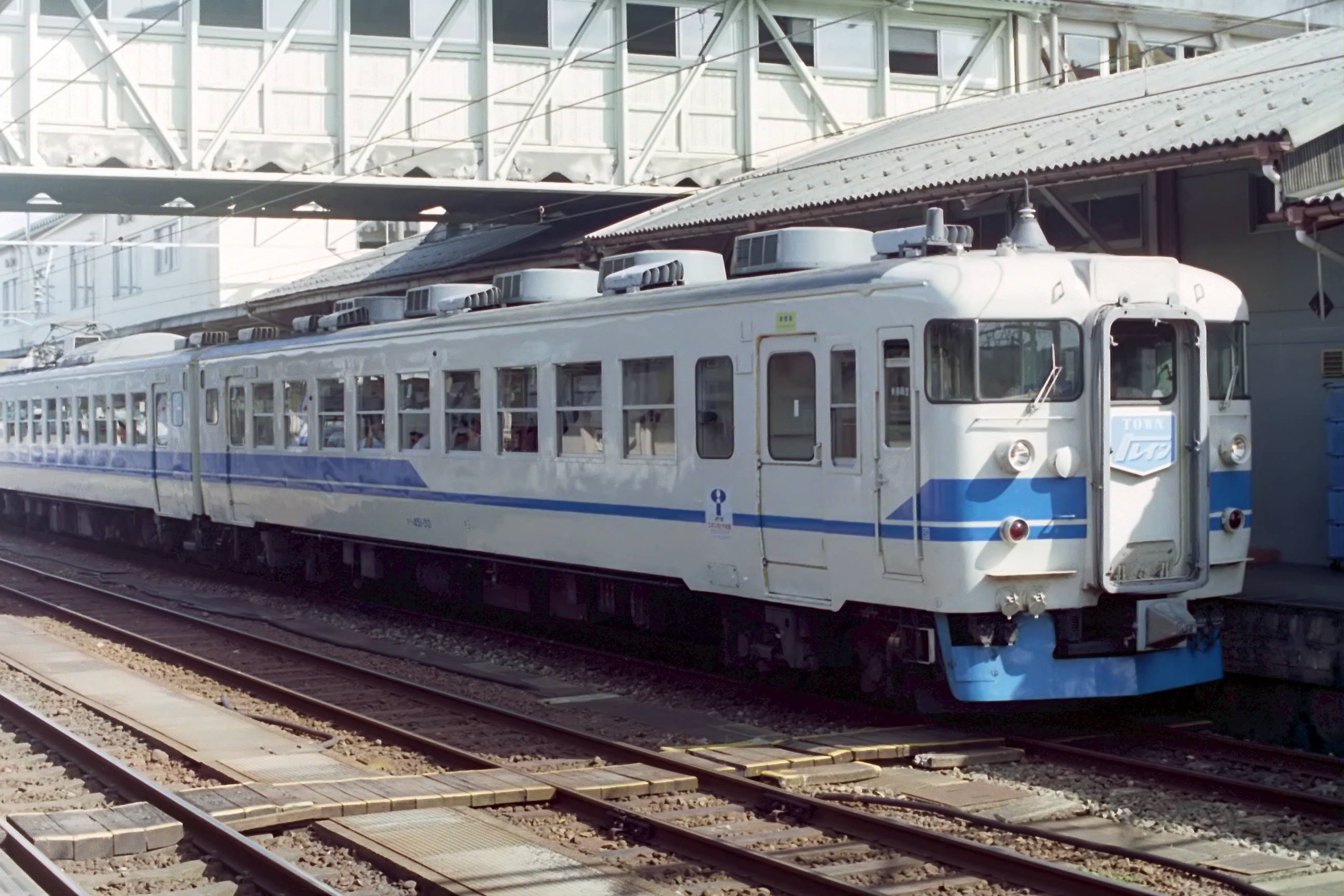 クハ451-33 富山駅